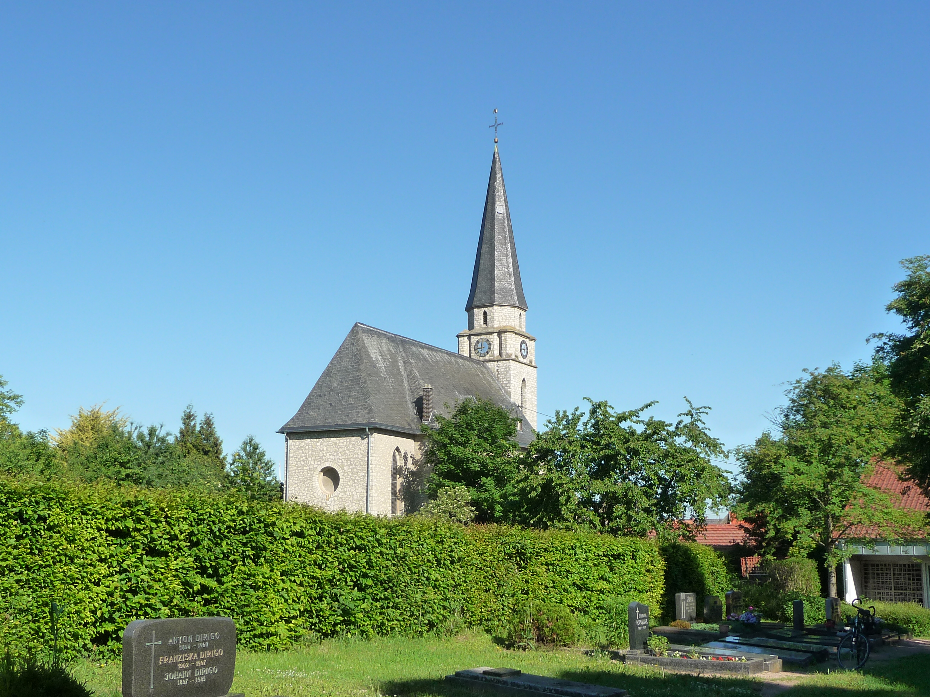 Ober-Flörsheim ist eine Ortsgemeinde im Landkreis Alzey-Worms in Rheinland-Pfalz.